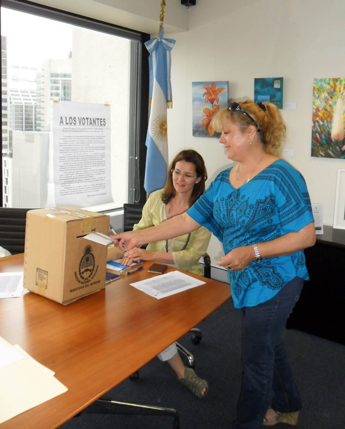 Sydney, Australia. Octubre 23 de 2011. Los argentinos comenzaron a votar desde las 18 hora argentina, por el huso horario 14 horas adelantado al de nuestro país. Ese consulado cuenta con 709 personas empadronadas y se habilitaron dos mesas para votar.